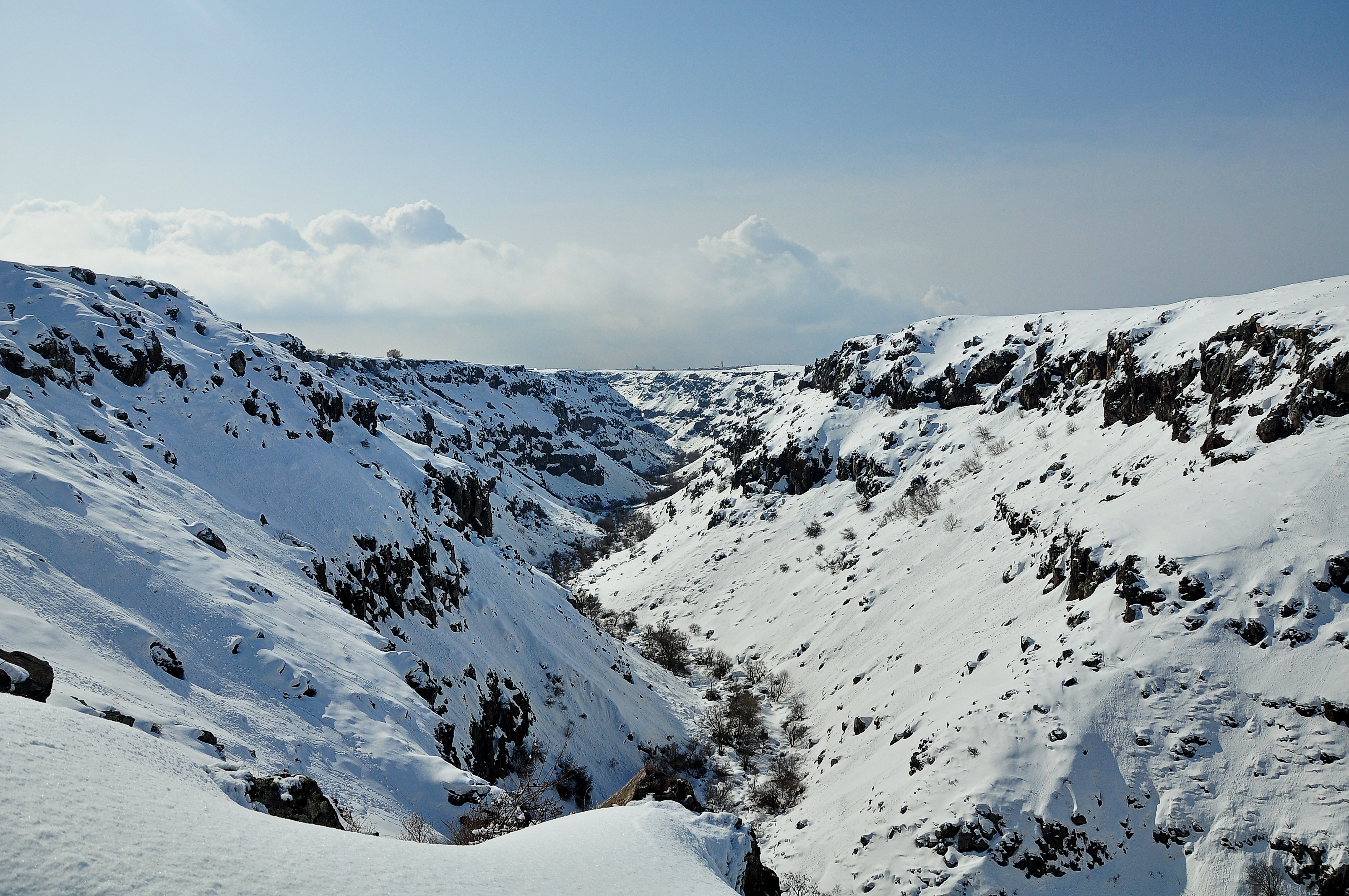 Քասախի կիրճը ձմռանը